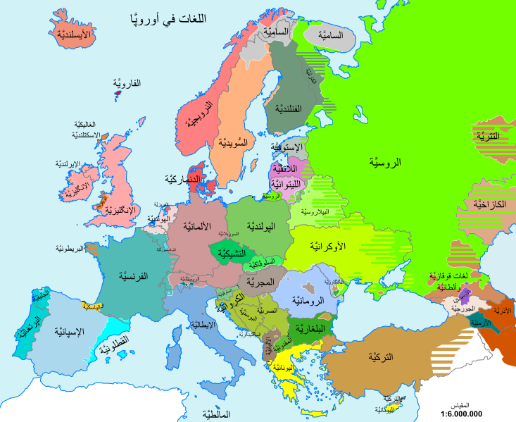 لُغات أوروپَّا (لا مصدر).